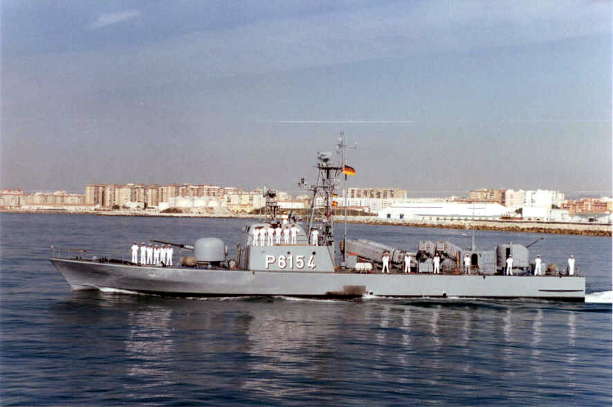 German patrol boat Elster